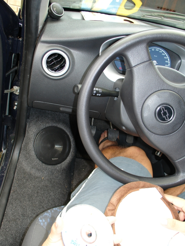 Kit componente de alto-falantes instalados em pézinhos e no painel.